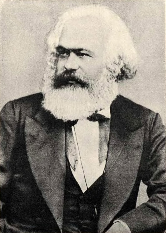 Fotografia Karola Marksa wycięta z książki File:Lenin - Karol Marks.djvu